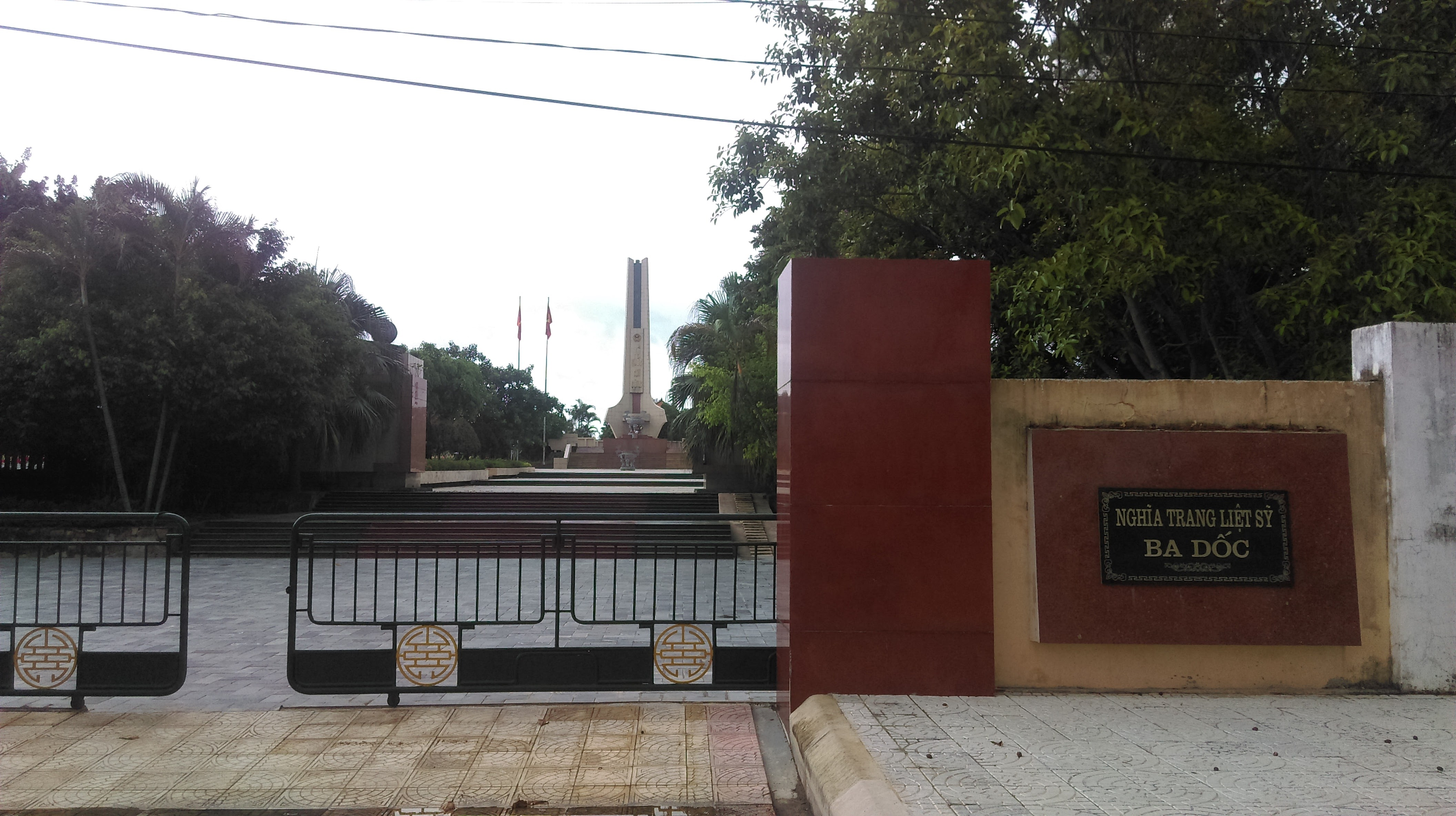 Nghĩa trang Liệt sĩ Ba Dốc, Lý Trạch, Bố Trạch, Quảng Bình